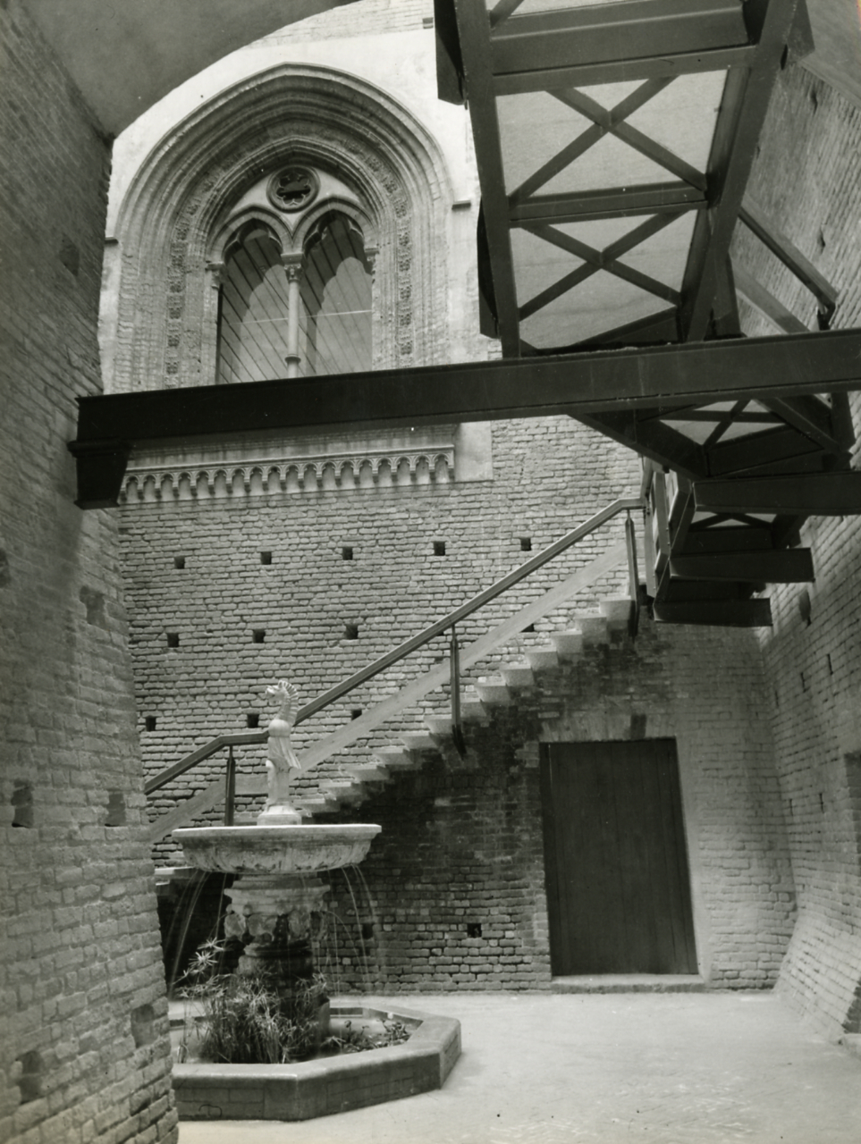 Servizio fotografico : Milano, 1961 / Paolo Monti. - Stampe: 4 : Positivo b/n, gelatina bromuro d'argento/ carta, 24x30. - ((Al verso delle stampe manoscritti i numeri dei negativi corrispondenti secondo altra numerazione: 214, 231, 290. Una stampa è identificata con il numero del negativo corrispondente (formato 35 mm) e indicazione del fotogramma, secondo numerazione standard: 3515/7. . - Timbro a inchiostro con data e copyright: "Copyright 1961 di Paolo Monti/ Studio 22/ Corso Sempione [...]/ Milano [...]". - Sul coperchio della scatola iscrizione didascalica manoscritta a pennarello nero: "Milano". - Occasione: Documentazione del riordino e sistemazione dei Musei del Castello e per la pubblicazione: Belgiojso L., Peressutti E., Rogers E.N., "Il riordino dei Musei del Castello Sforzesco di Milano", in "Casabella", n. 211, 1956. - Fonte: Rubrica di Paolo Monti: Archivio 10x12 (ultimi numerati) - dal G1 al (s.d.), presso Archivio Paolo Monti. - Fonte: Monografia di Belgiojoso L. Peressutti E., Rogers E.N.: Il riordino dei Musei del Castello Sforzesco di Milano, in Casabella, n. 211 (1956)